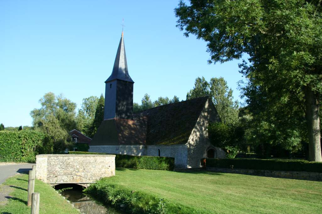 Église de Courgent - Yvelines (France)